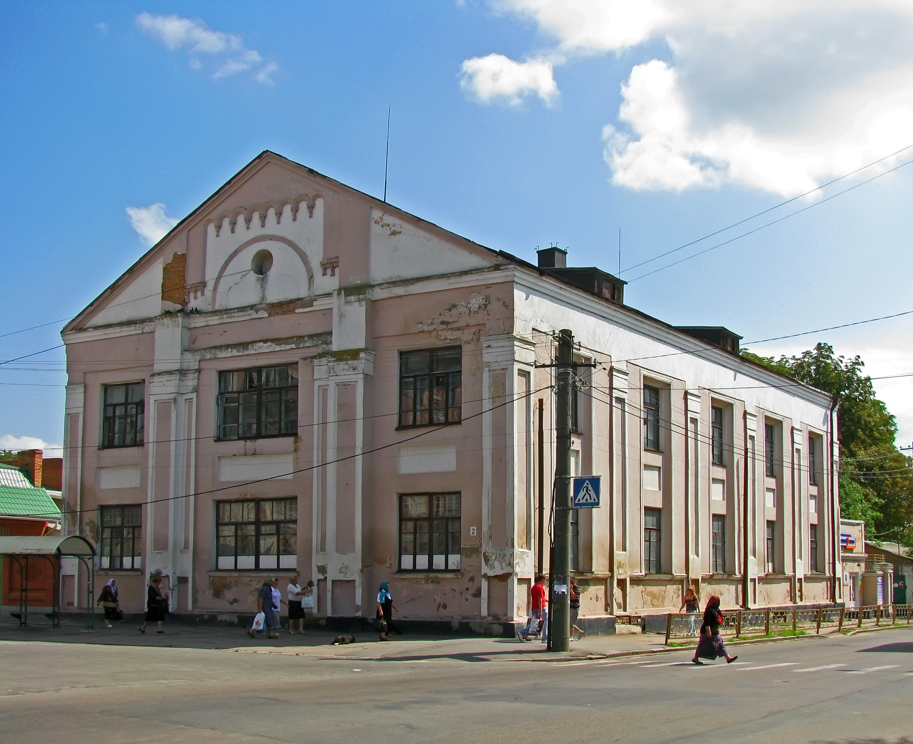 Синагога, Бердичів, вул. Свердлова, 8